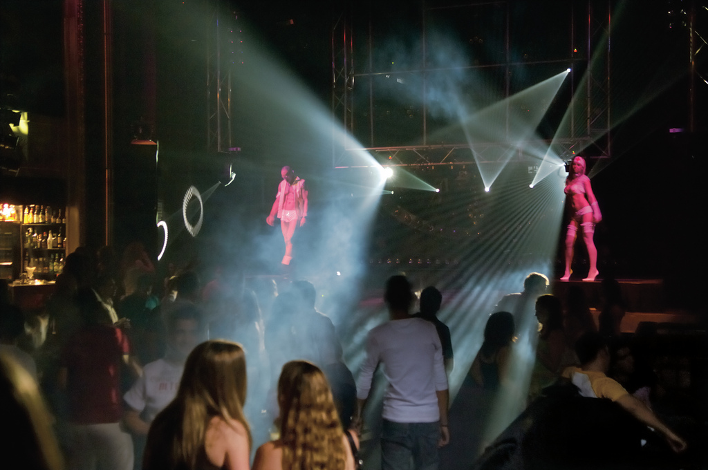 Joy - Madrid Discoteque This photograph can be used for publications, including this copyright statement: “©PromoMadrid, author Max Alexander”. Esta fotografía puede usarse en publicaciones, incluyendo la declaración “©PromoMadrid, autor Max Alexander”.